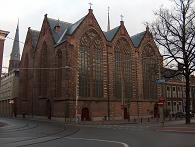 Kloosterkerk in Den Haag